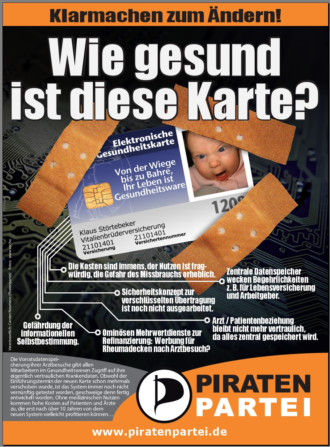 Flyer der Piratenpartei gegen die Elektronische Gesundheitskarte.